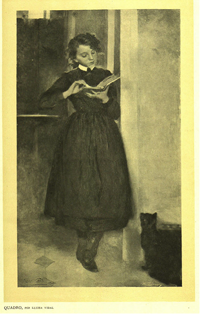 La nena del gatet negre pintat per Lluïsa Vidal Oli sobre tela, 156 x 90 cm Col·lecció privada